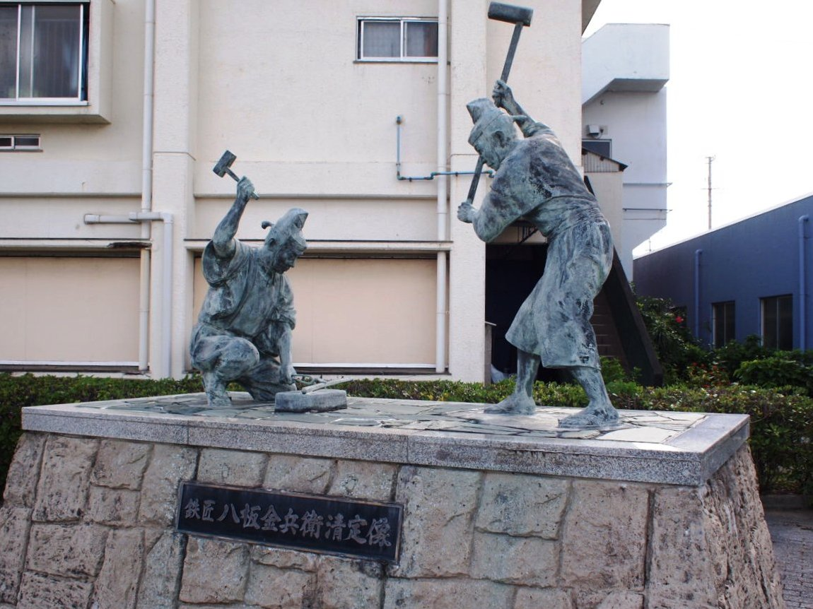 鹿児島県西之表市にある八板金兵衛清定の像